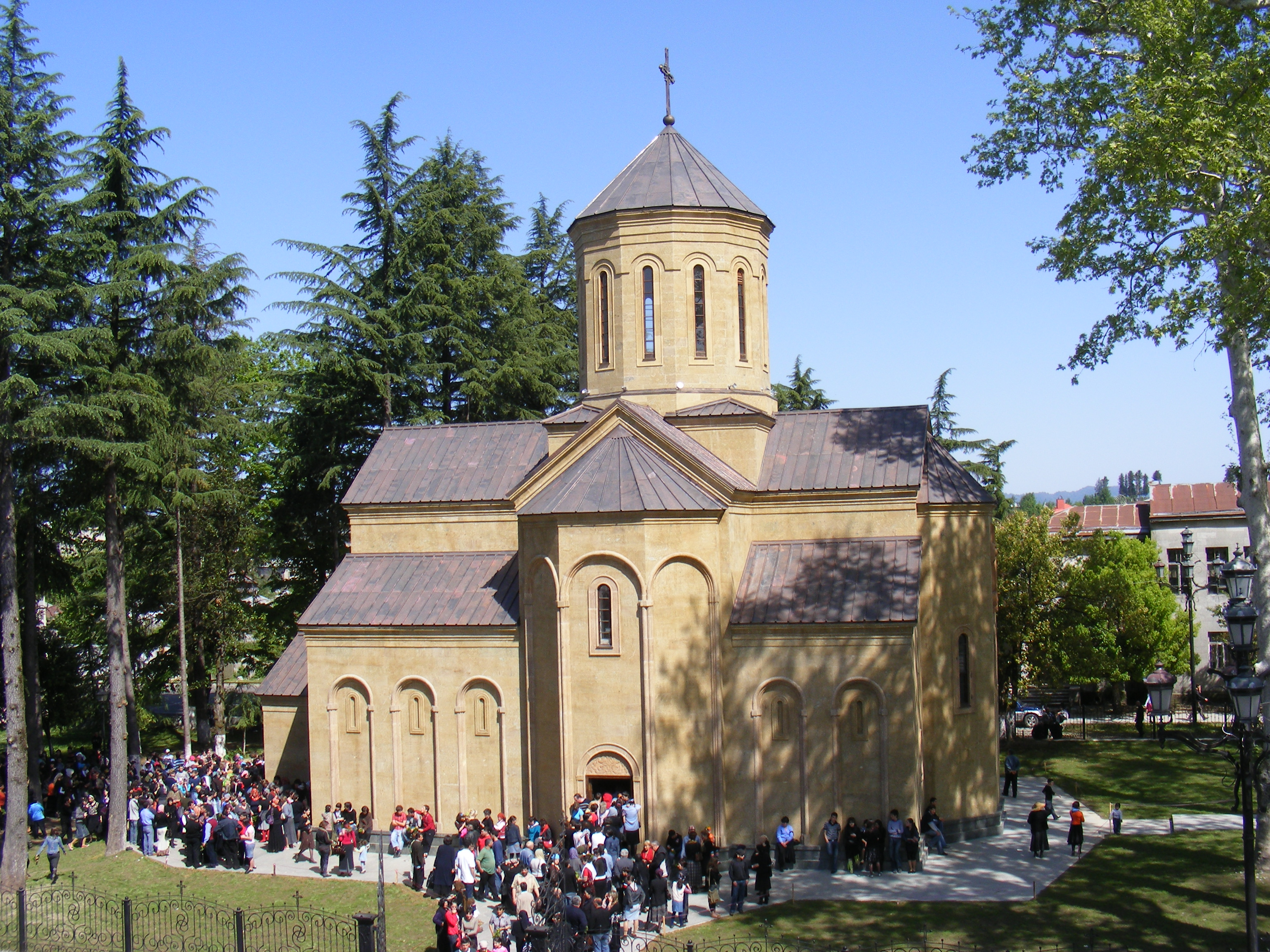 ღვთისმშობლის სახელობის ეკლესია ქალაქ ოზურგეთში, აშენებულია 2007 წ.